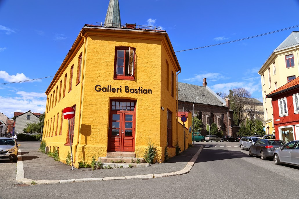 Normannsgata 44 i Oslo.